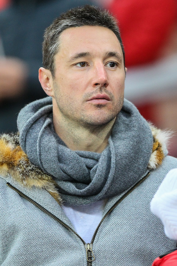 Ковальчук Илья Валерьевич. (Месси и Ко обыграли сборную России)